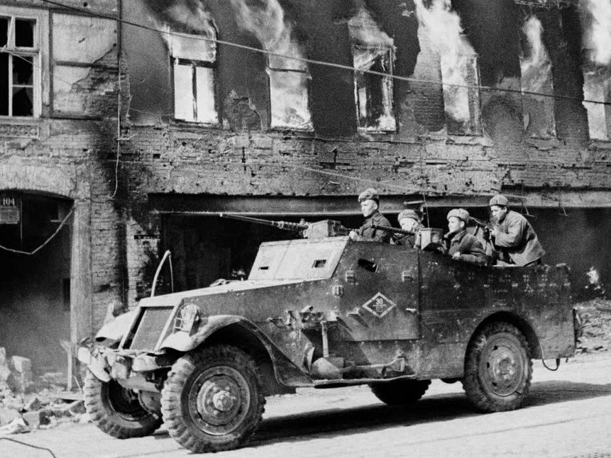 Разведывательный бронетранспортёр Скаут в Вене, 1945. 1-й Гвардейский механизированный корпус.